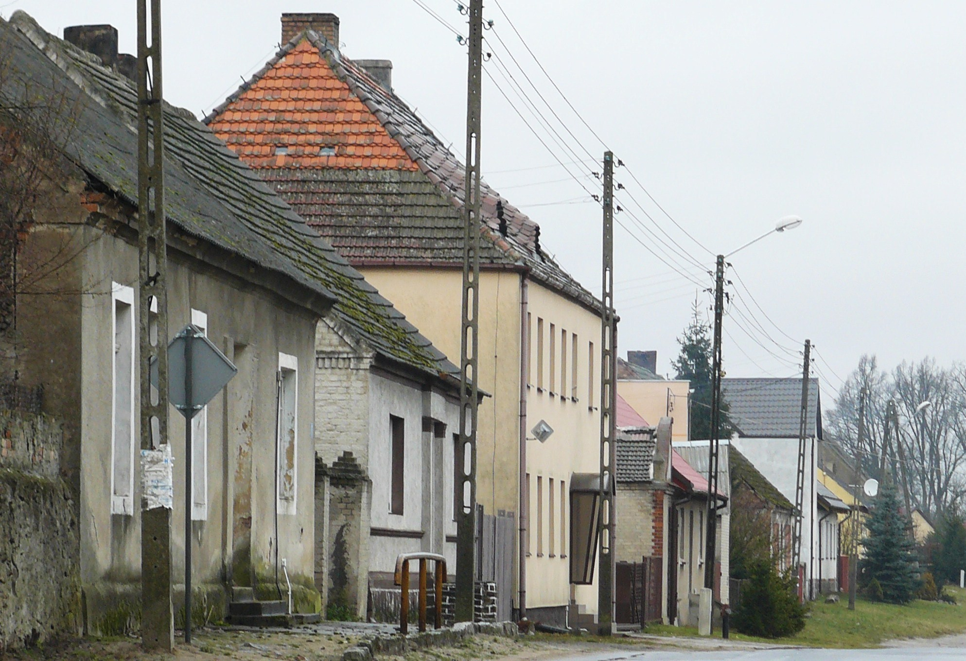 Biała koło Trzcianki - architektura.